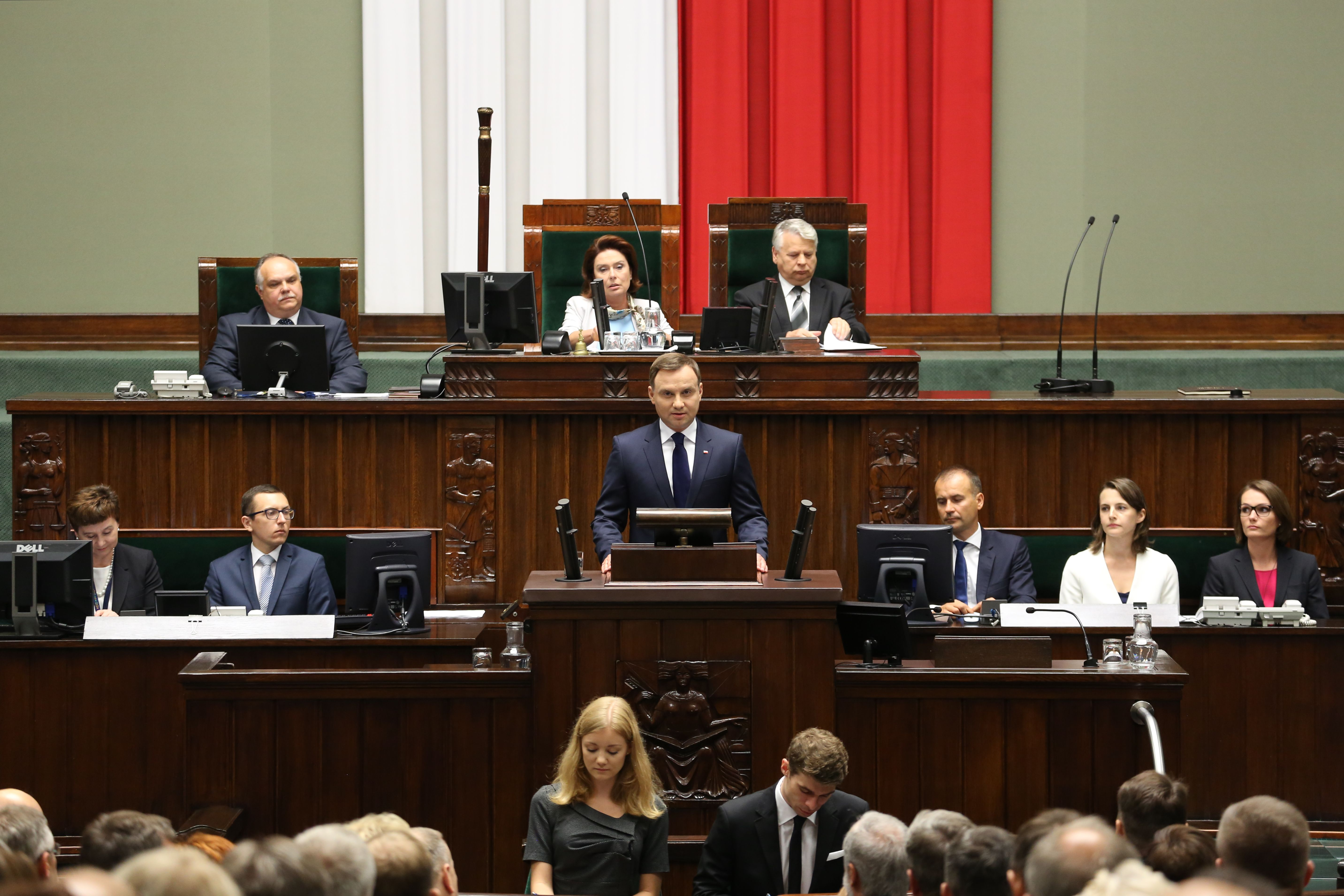 Prezydent Andrzej Duda wygłaszający orędzie przed Zgromadzeniem Narodowym zwołanym w celu odebrania przysięgi od nowo wybranego prezydenta